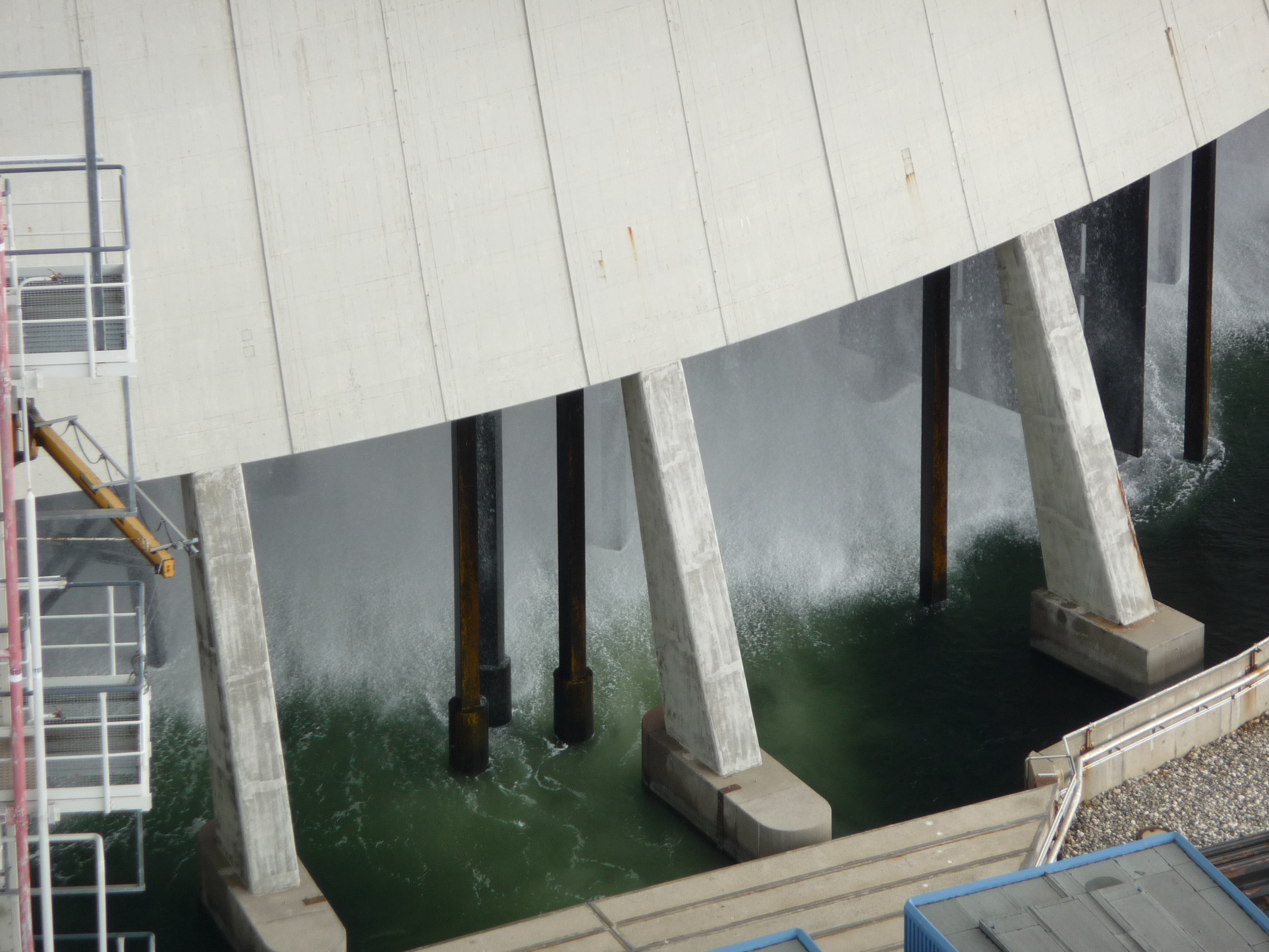 Detailaufnahme: Kühlturm des Rostocker Kraftwerks